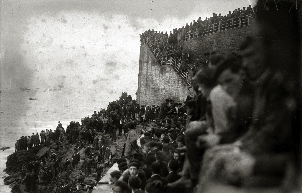 Título original: Celebración de las regatas de la Concha (2/12) Localización: San Sebastián (Guipúzcoa)